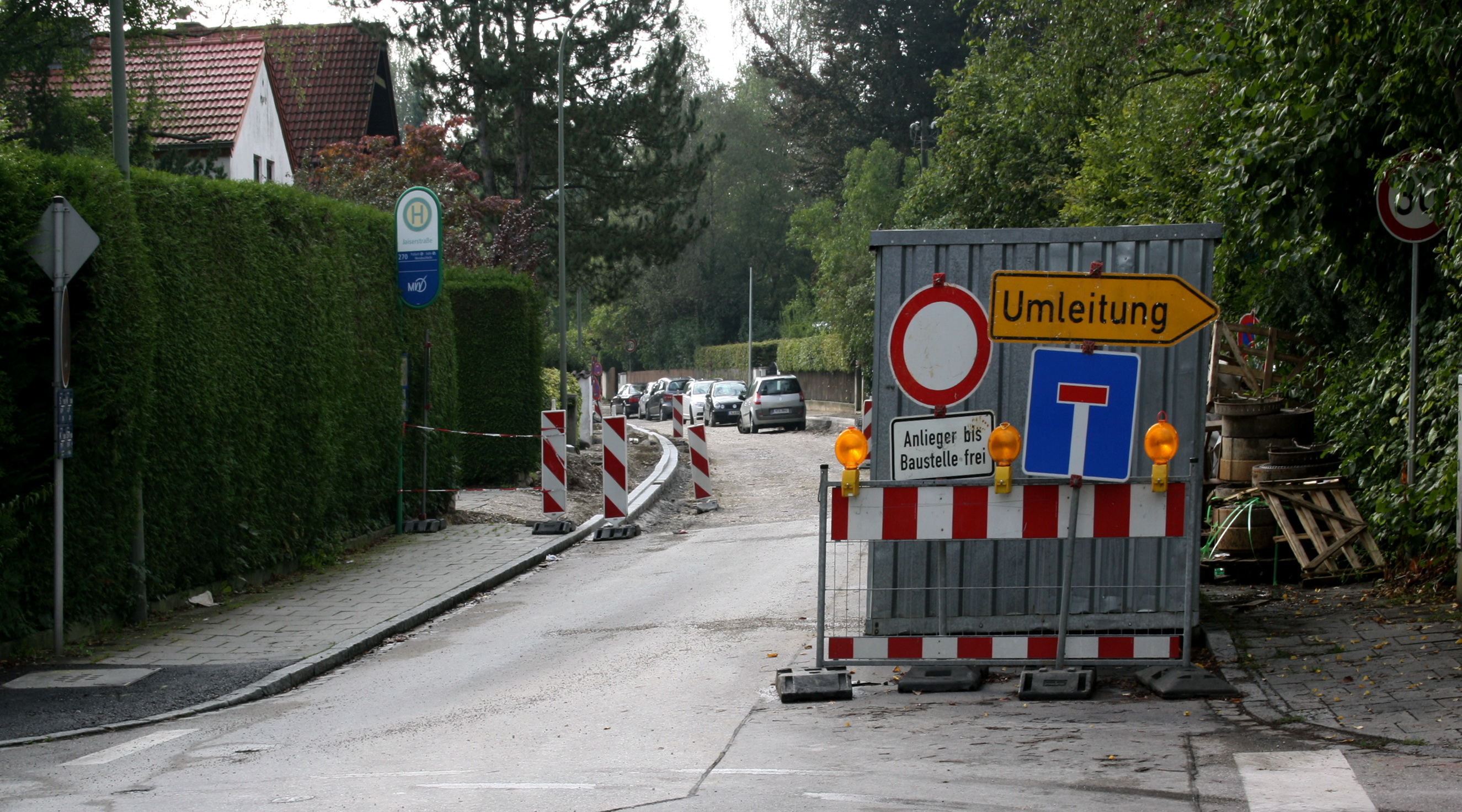 Baustelle in Pullach im Isartal bei Straßenarbeiten. Beschilderung für Umleitung.